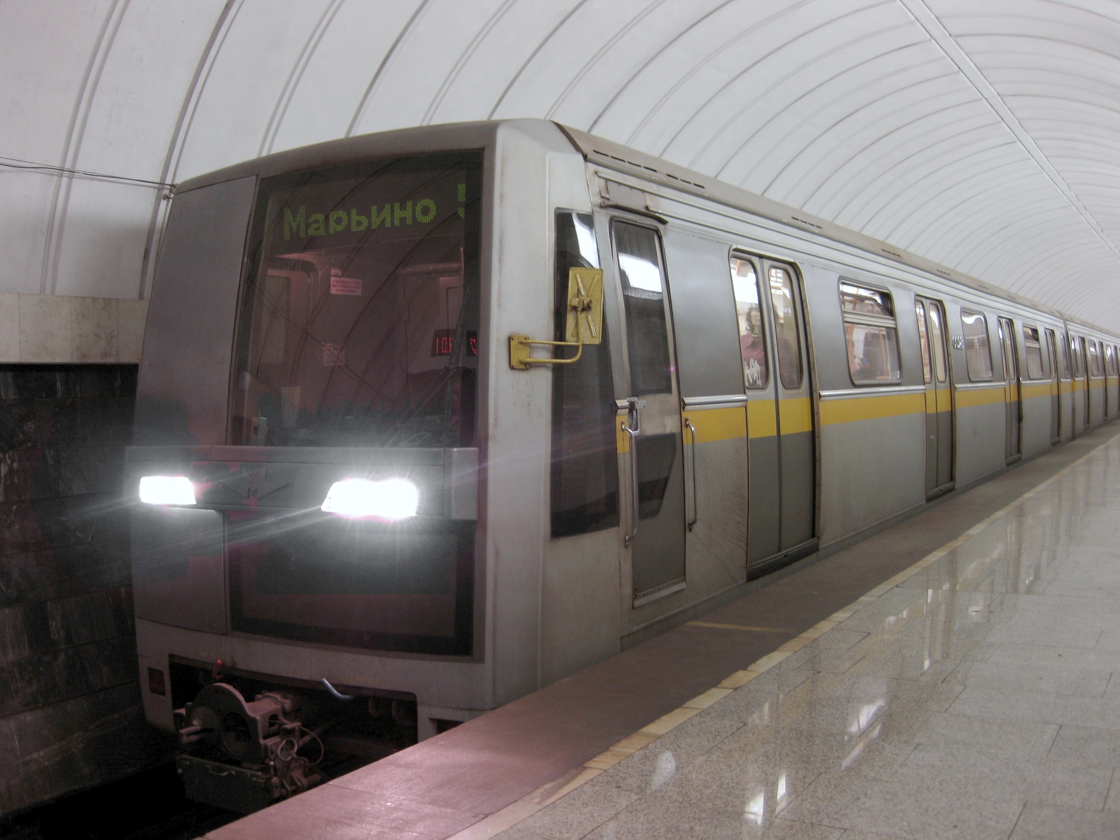 Вагон 81-720 на станции метро Дубровка